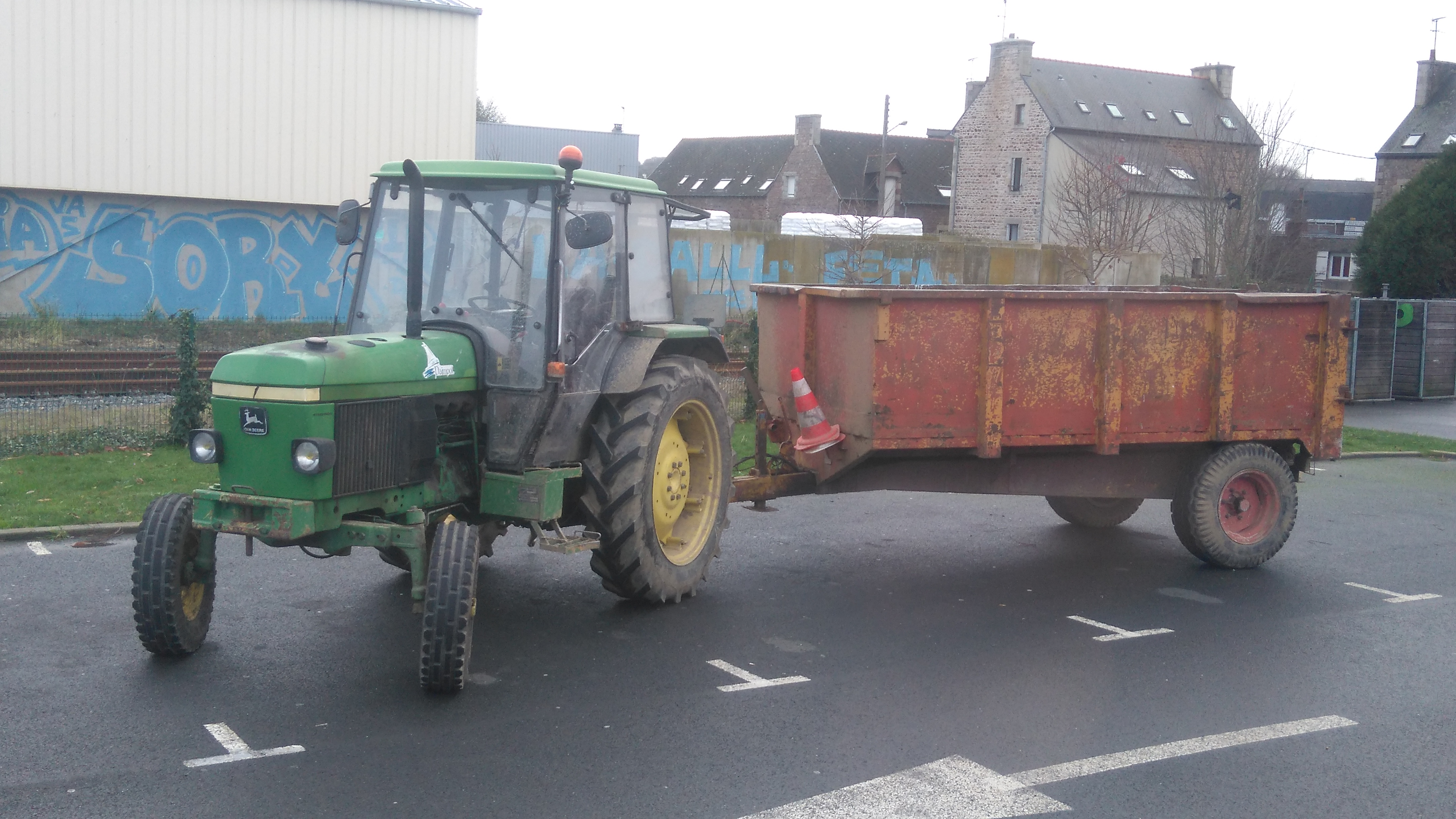 Tracteur John Deere - Commune de Paimpol